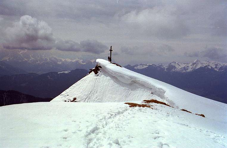 Gipfel des Hochgern in den Chiemgauer Alpen